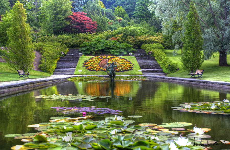 The Botanical Garden in Gothenburg, Sweden.